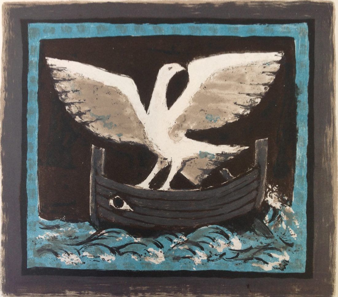 Litografi av Arne E. Holm, ukjent tittel